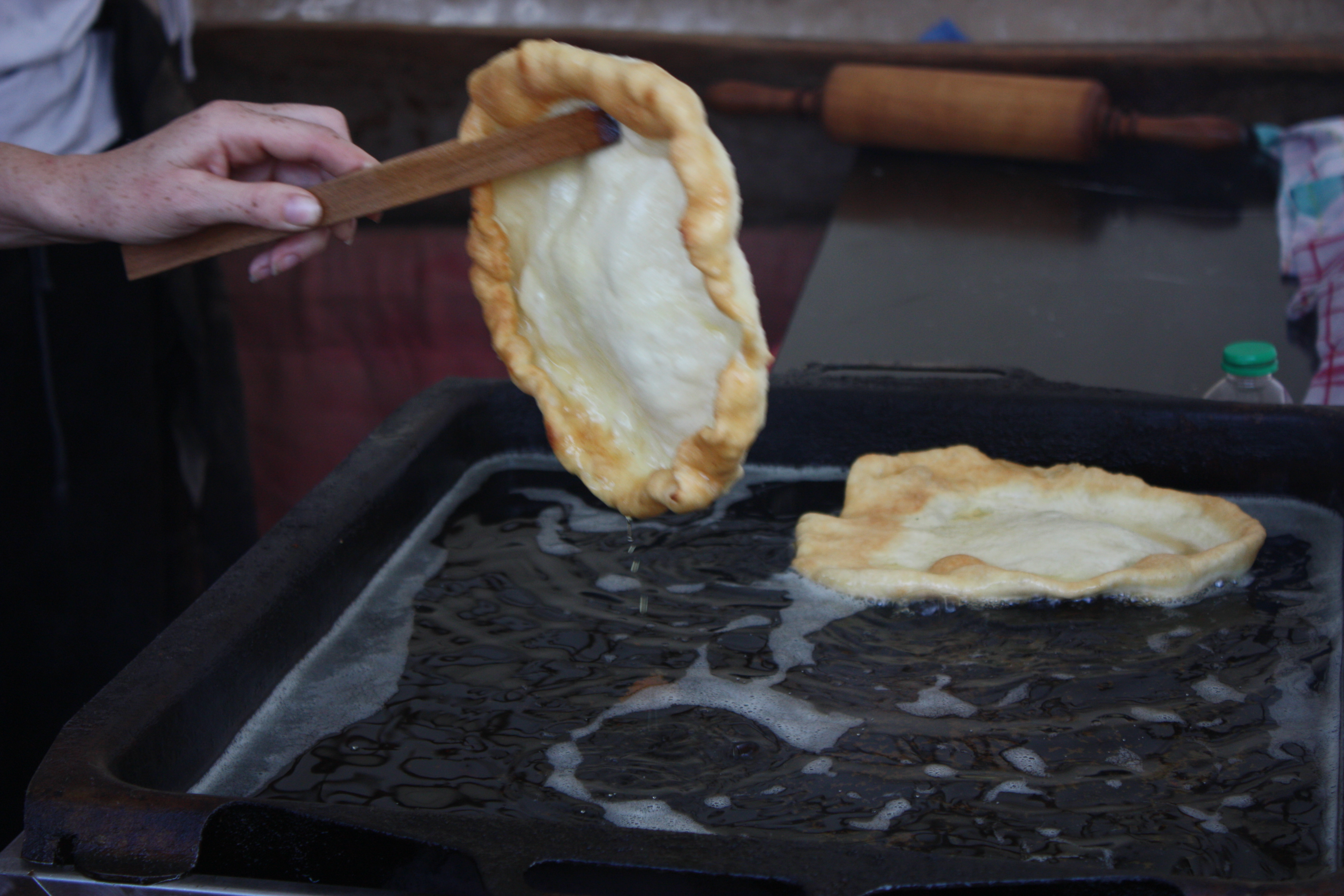 Langos